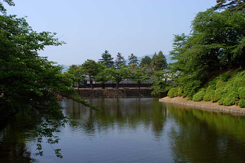 Moat of Yonezawa Castle, Yonezawa, Yamagata, Japan